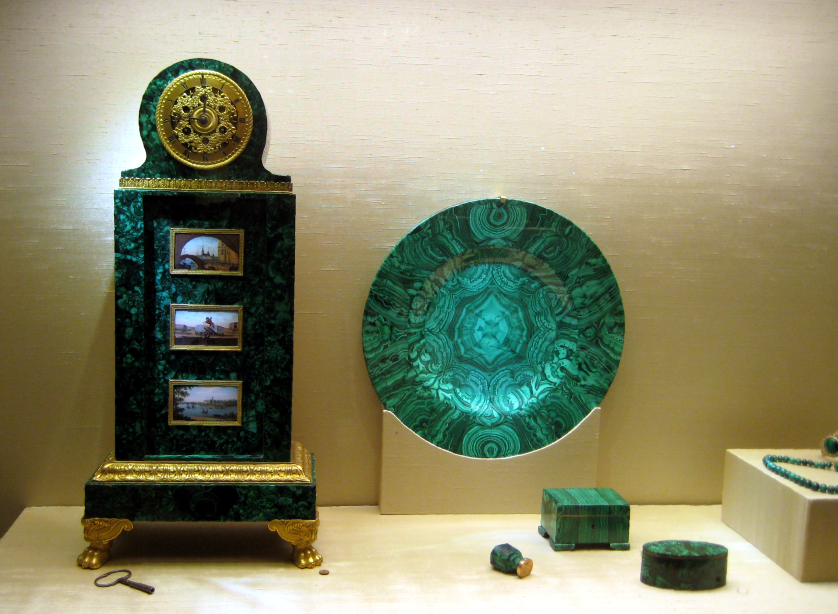 1. Часы. СПб, 1820-30-е. Малахит, фарфор, медь, бронза. Музеи Моск. Кремля. 2. Блюдо. Екатеринбургская гранильная фабрика (?). Сер. 19 века. Малахит. Музей истории камнерезного и ювелирного искусства 3. Печать. Екатеринбург, 19 век. 19 век. Музей истории камнерезного и ювелирного искусства 4. Малахитовая шкатулка. Екатеринбург, 19 век. 19 век. ГИМ 5. Туалетная коробочка. Екатеринбург. Посл. треть 19 в. ГИМ